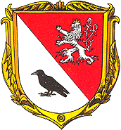 Veltrusy - znak města.